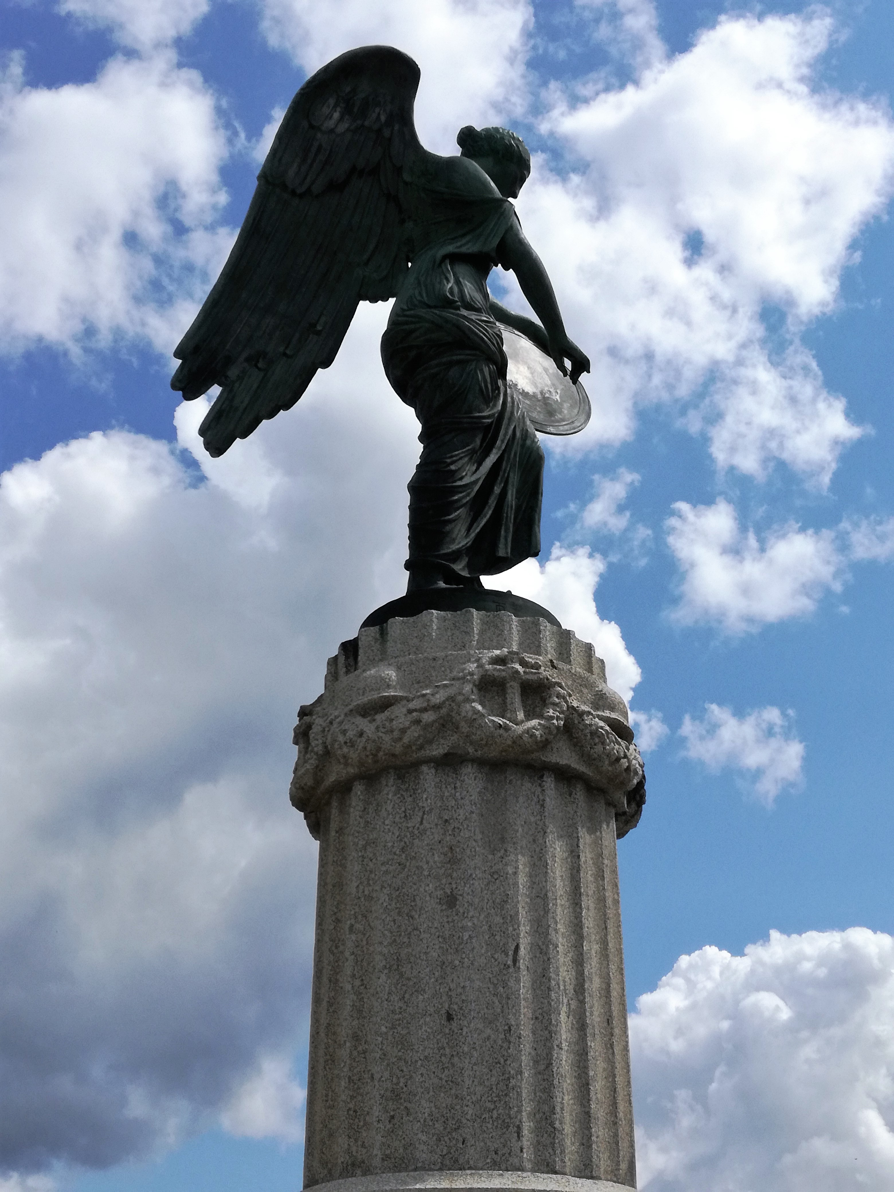 Kriegerdenkmal Tonalepass - Geflügelte Siegesgöttin